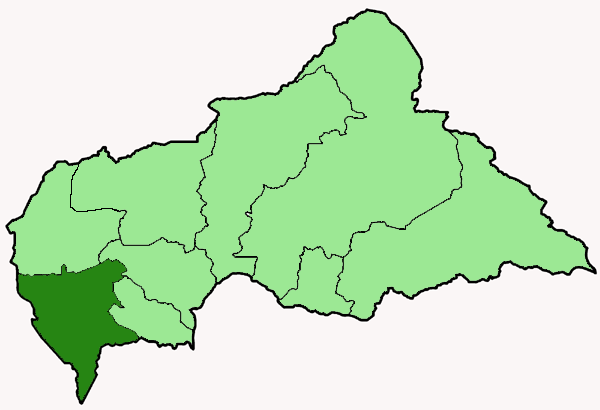 Mappa della diocesi cattolica di Berberati, nella Repubblica Centrafricana. Anno 2009.